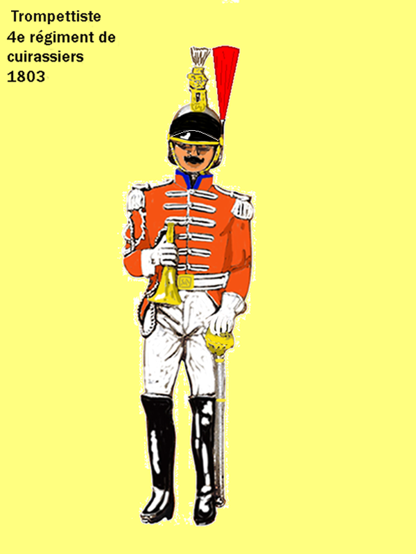 Trompeter des 4. Franz. Kürassierregiments